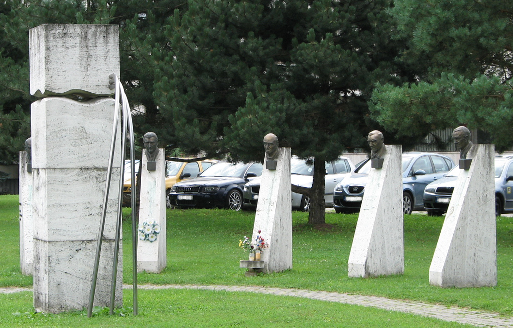 Busty zakladateľov kúpeľov Dudince zo začiatku 70. rokov